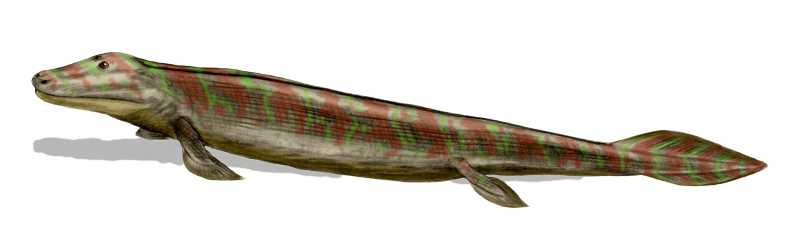 Tiktaalik rosae, pencil drawing, digital coloring